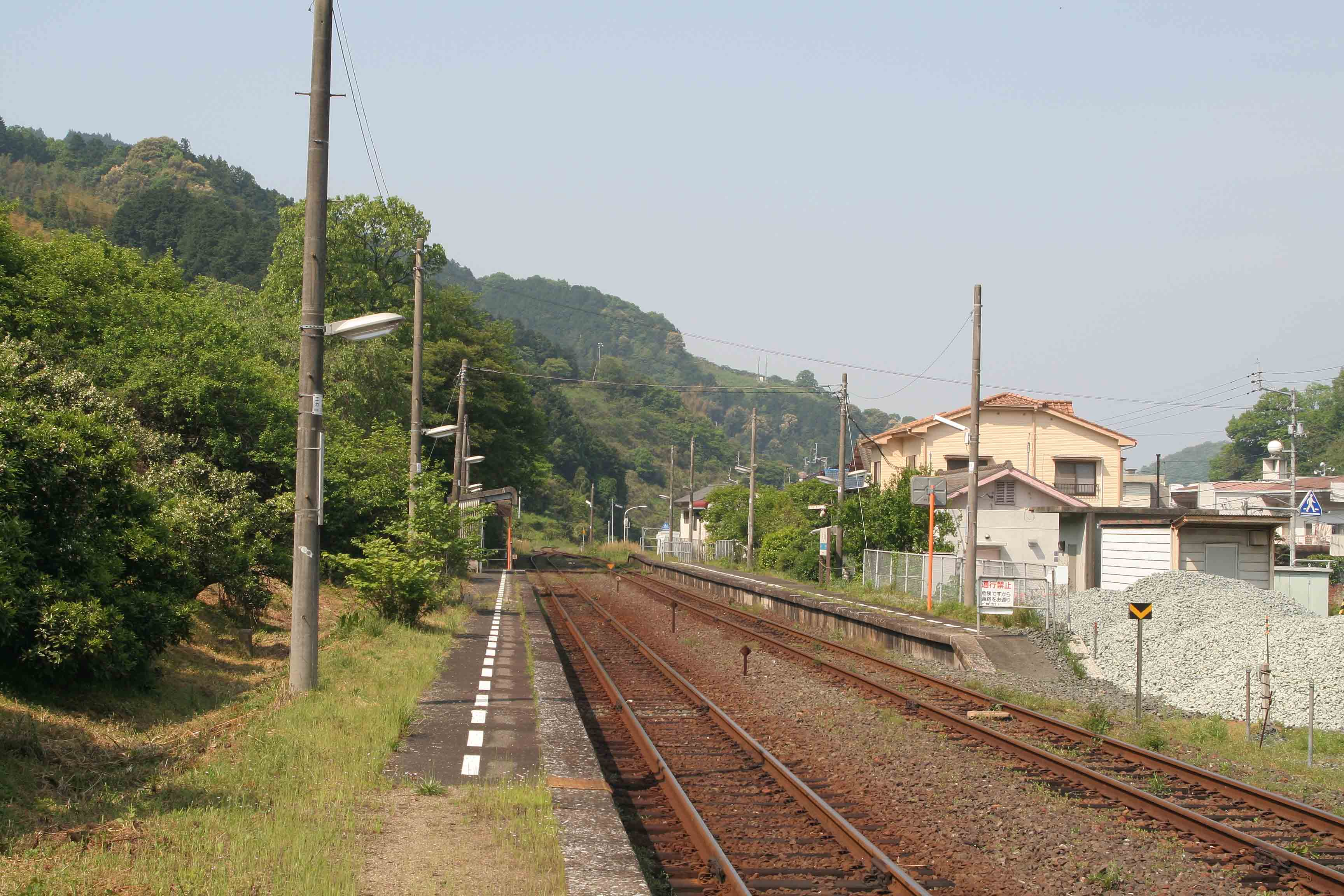 千丈駅の構内の様子